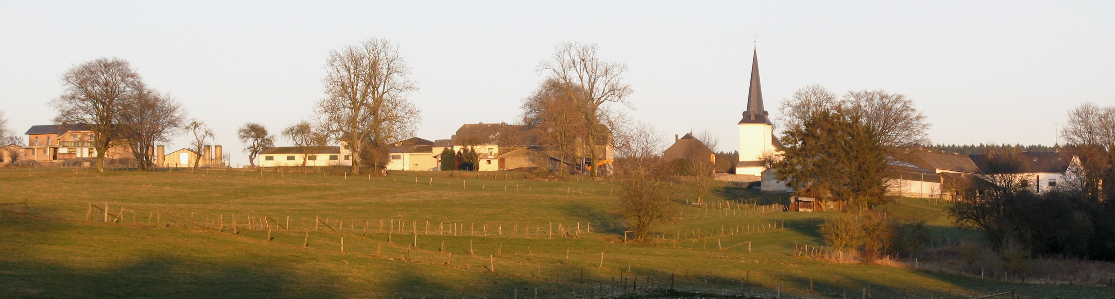 Allerbuer aus dem Dall vun der klenger Baach Brill gesinn. Allerbuer + Kategorie:Gemeng Wëntger